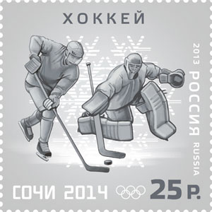 XXII Олимпийские зимние игры 2014 года в г. Сочи. Олимпийские зимние виды спорта